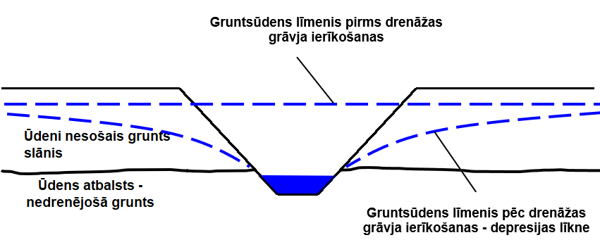 Drenāžas grāvis